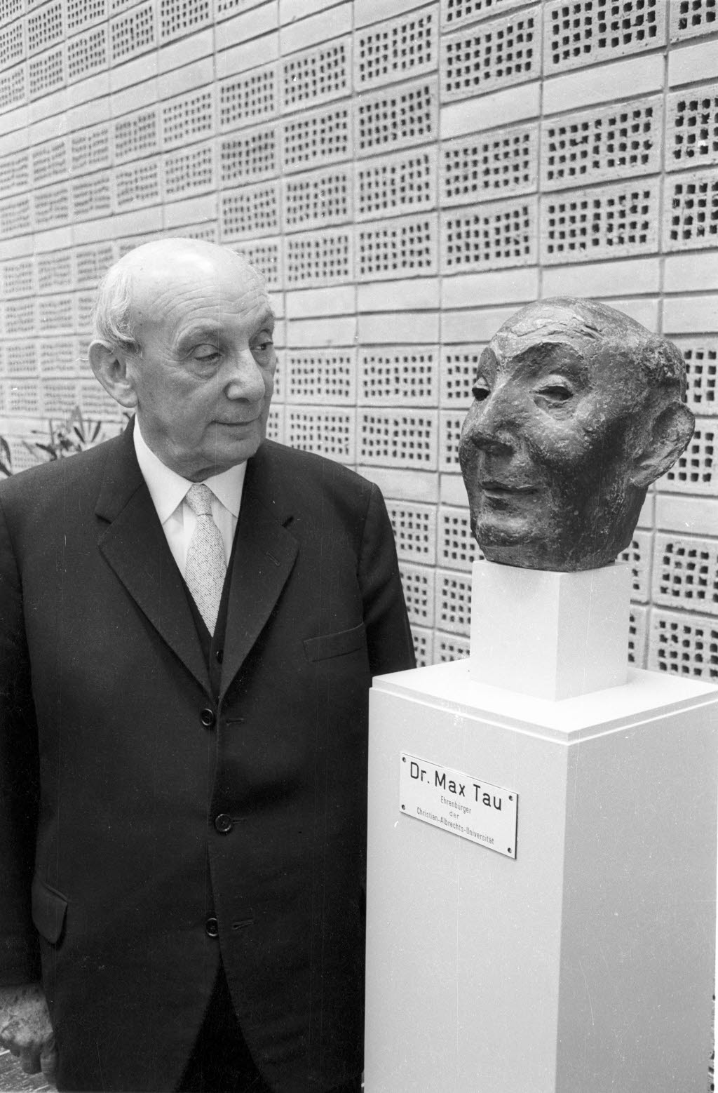 Der Porträtierte neben der Büste, einer Kopie der vom Bildhauer Kurt Lehmann für die Max-Tau-Schule gefertigten Büste. Max Tau war seit 1964 Ehrenbürger der CAU.